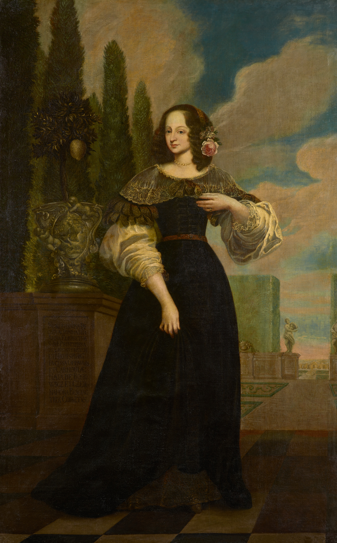 Fuerstin Anna Maria von Liechtenstein (unbek.-1625), geb. Cernohorský von Boskowitz